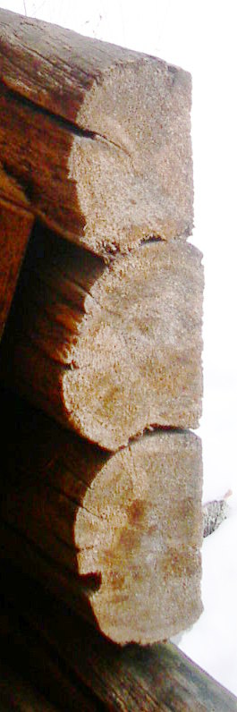 Stocktvärsnitt på enkelsidigt bilade stockar i en byggnad från mitten av 1600-talet, Forsen, Björbo